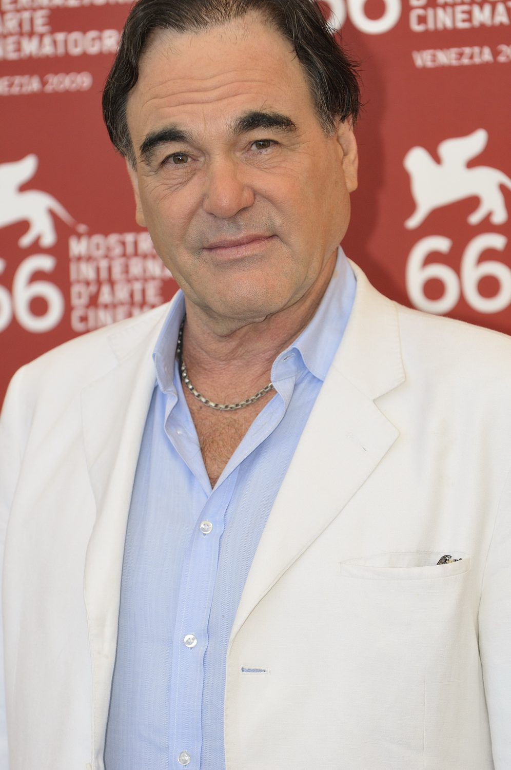 66ème Festival du Cinéma de Venise (Mostra), 6ème jour (07/09/2009) Oliver Stone